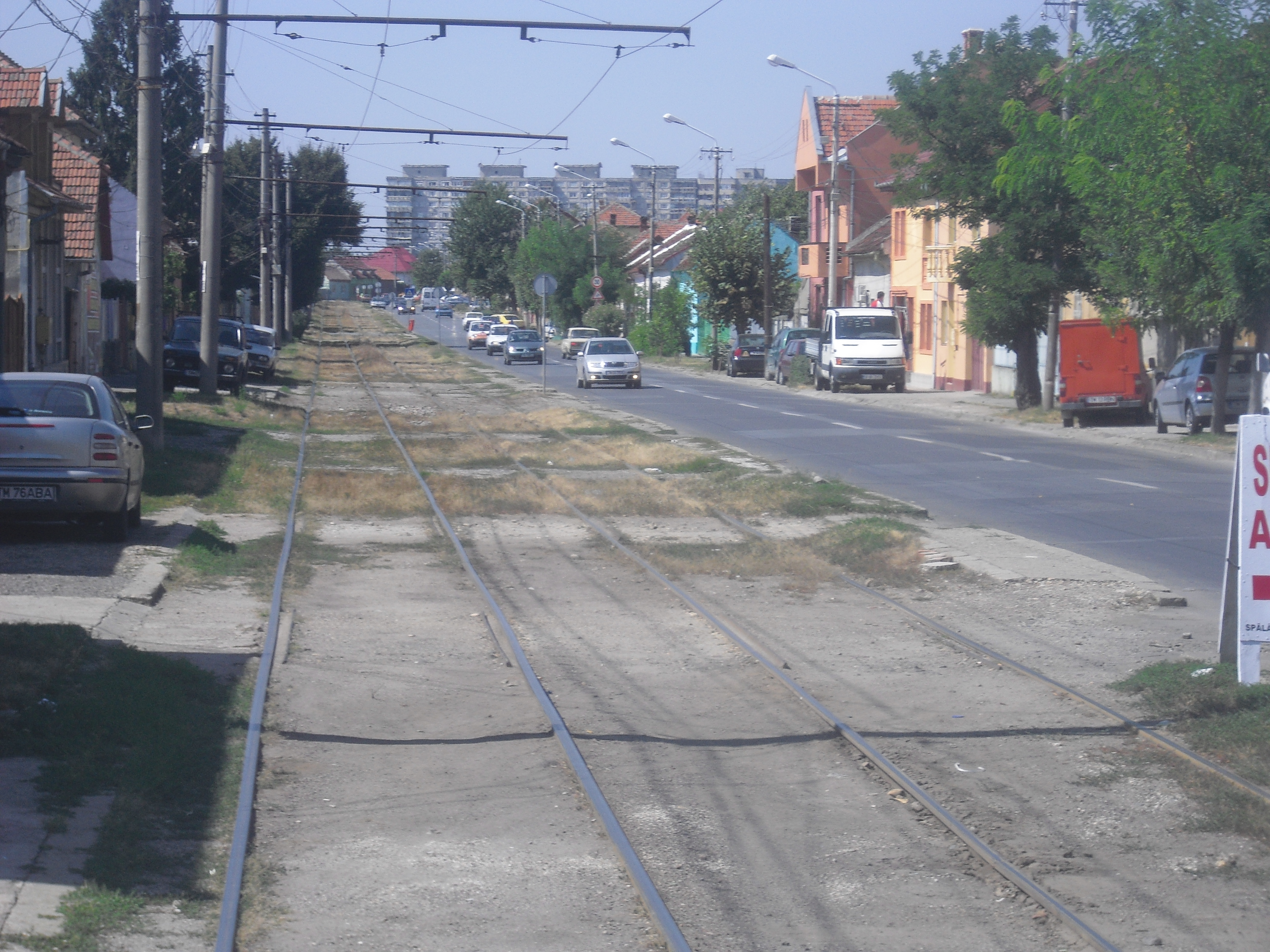 Straßenbahn in Timişoara (Rumänien)